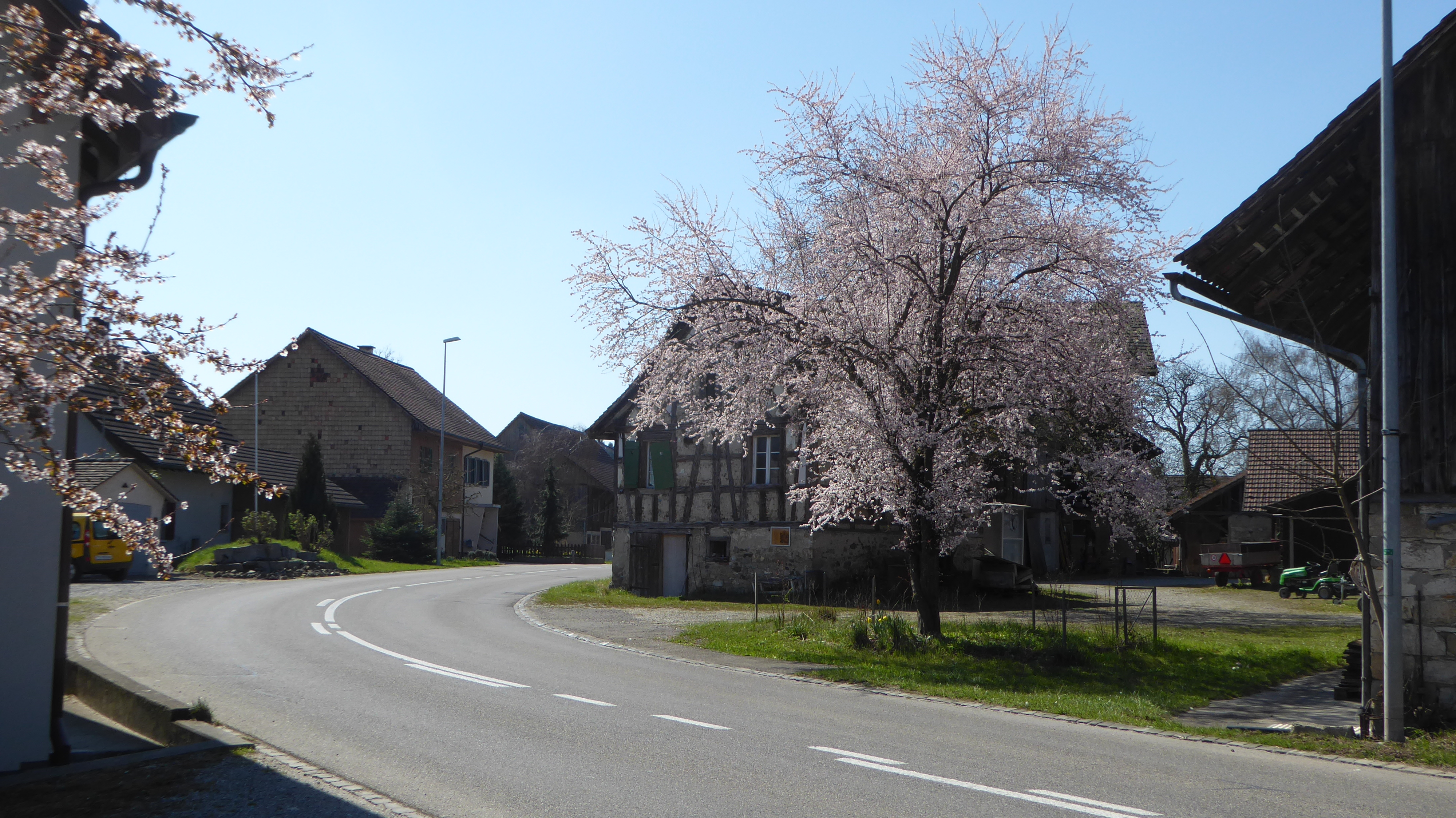 Dickihof von Norden